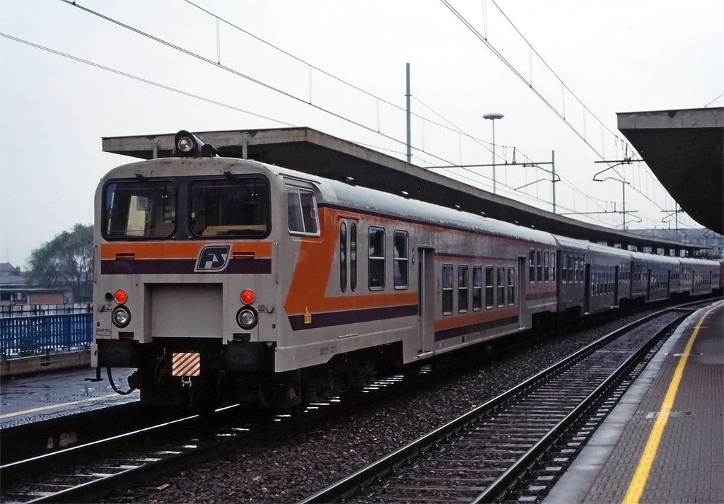 Treno di carrozze a piano ribassato in sosta a Milano Lambrate